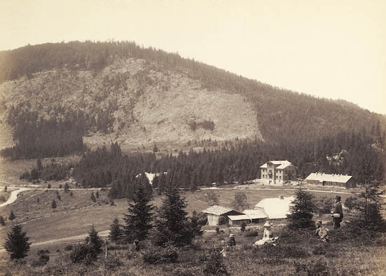 Špičák s pensionem Prokop